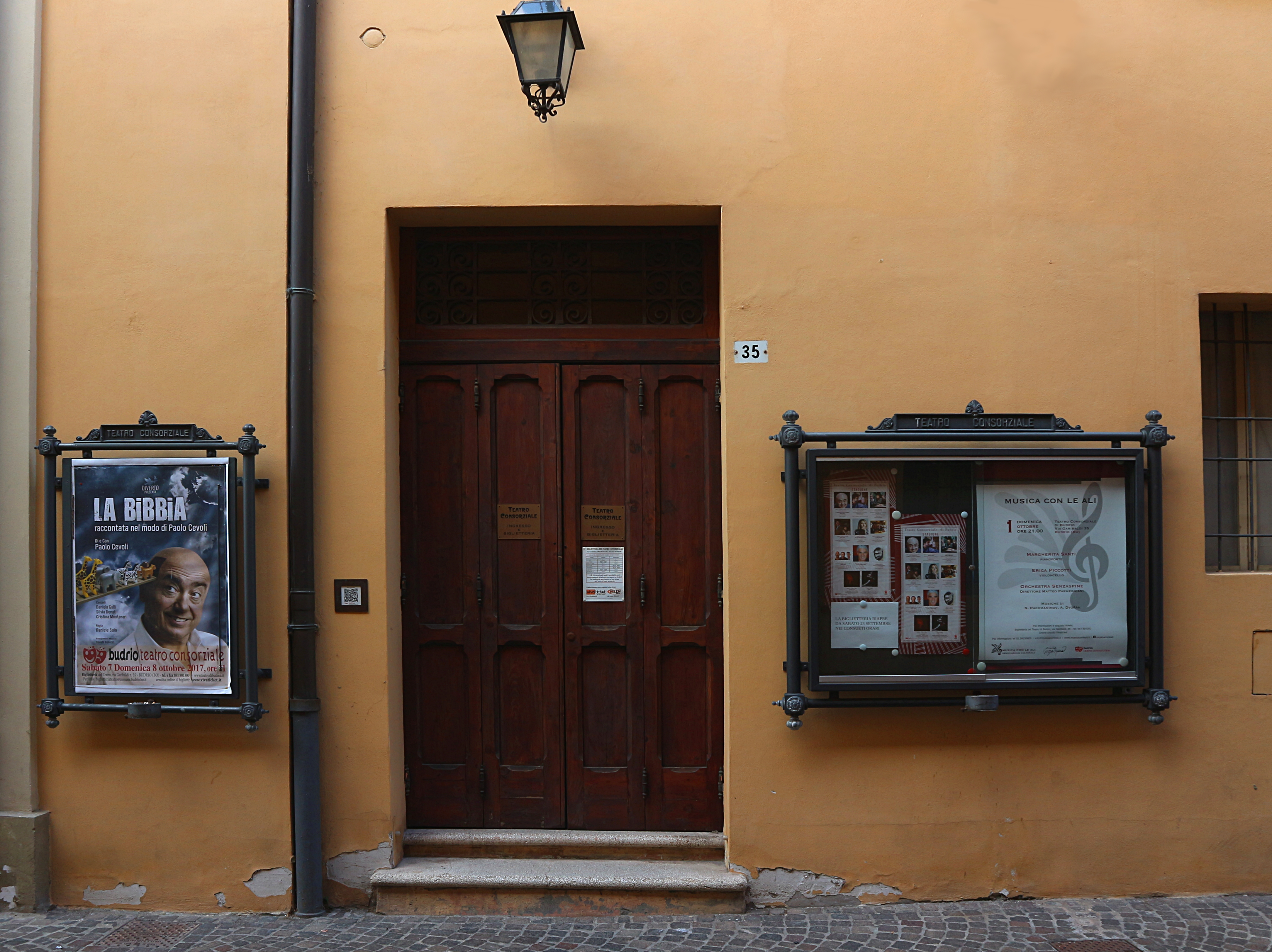 Entrata del Teatro Consorziale. Budrio, Bologna This is a photo of a monument which is part of cultural heritage of Italy.